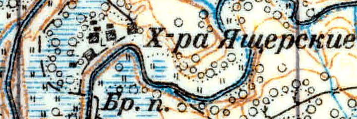 Топографическая карта Ленинградской области, квадрат VIc (Красные Горы), деревня Ящера